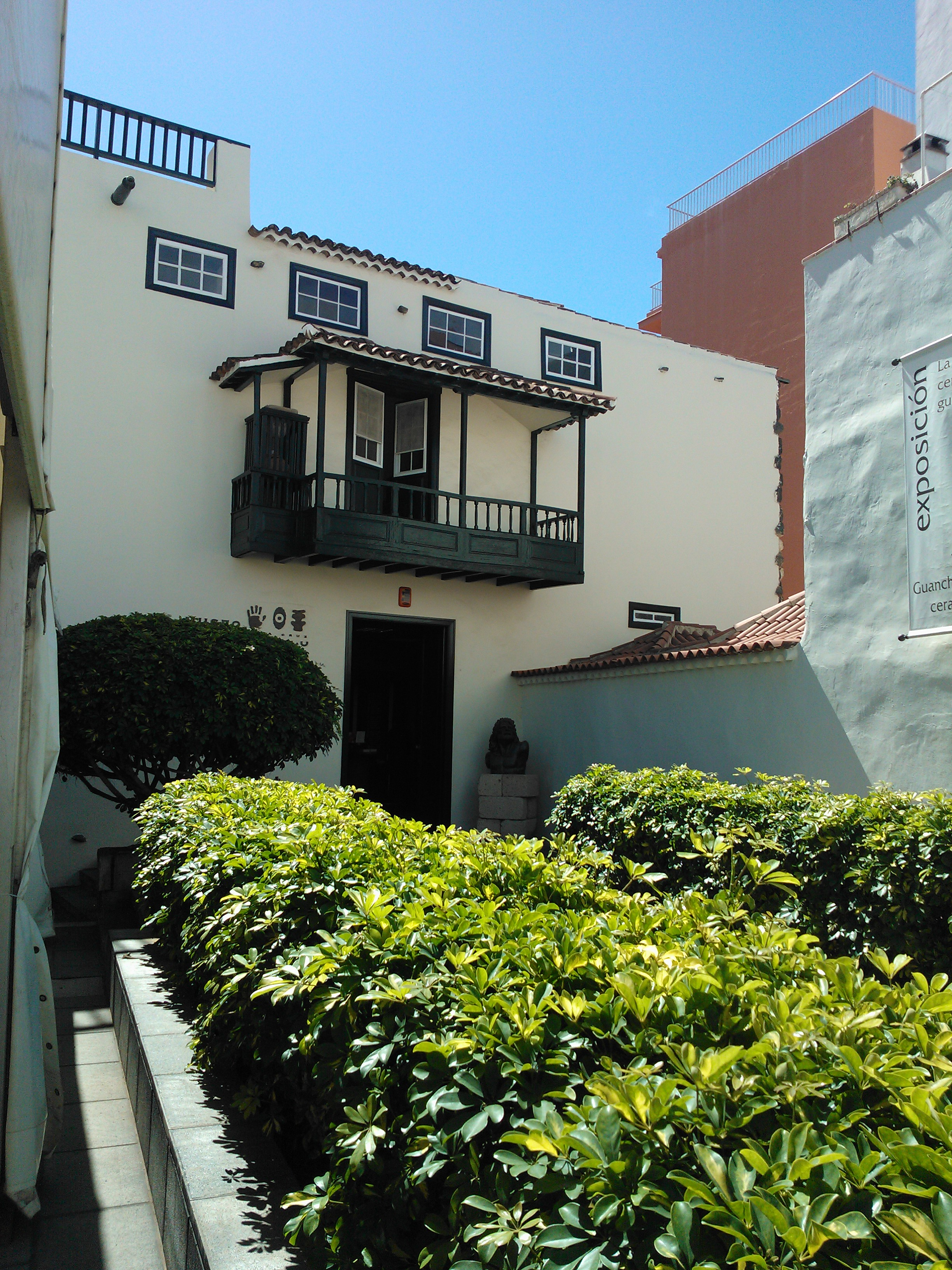 Археологический музей в Пуэрто-де-ла-Крус